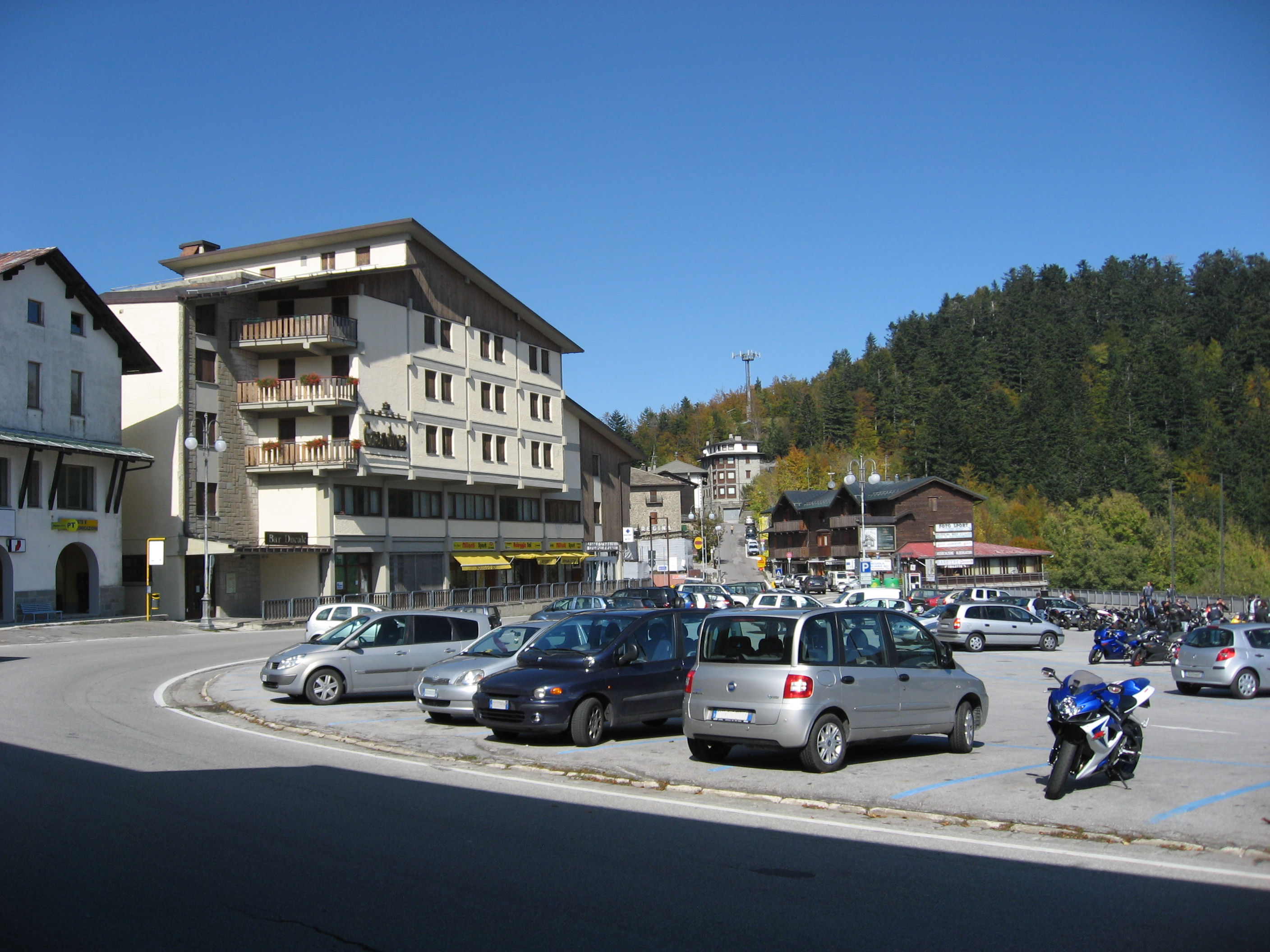 Abetone Pass